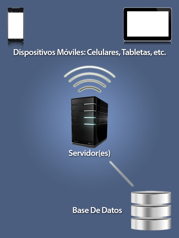 Arquitectura simple de una solución MDM, donde se presentan: agente, servidor y base de datos.